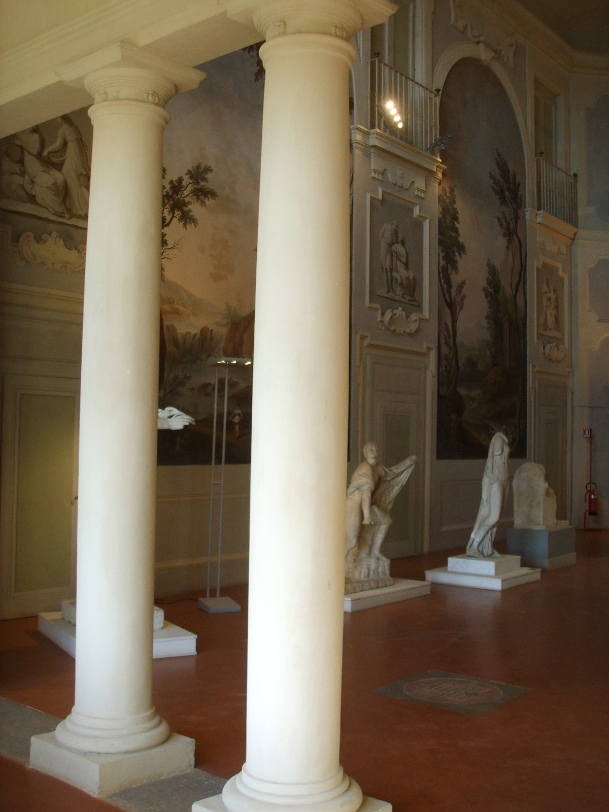 Villa Corsini, salone